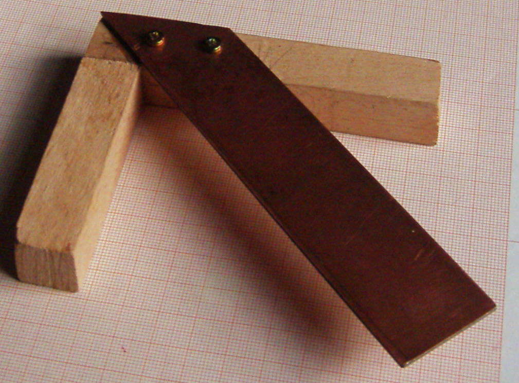 Zentrierwinkel (Eigenbau)